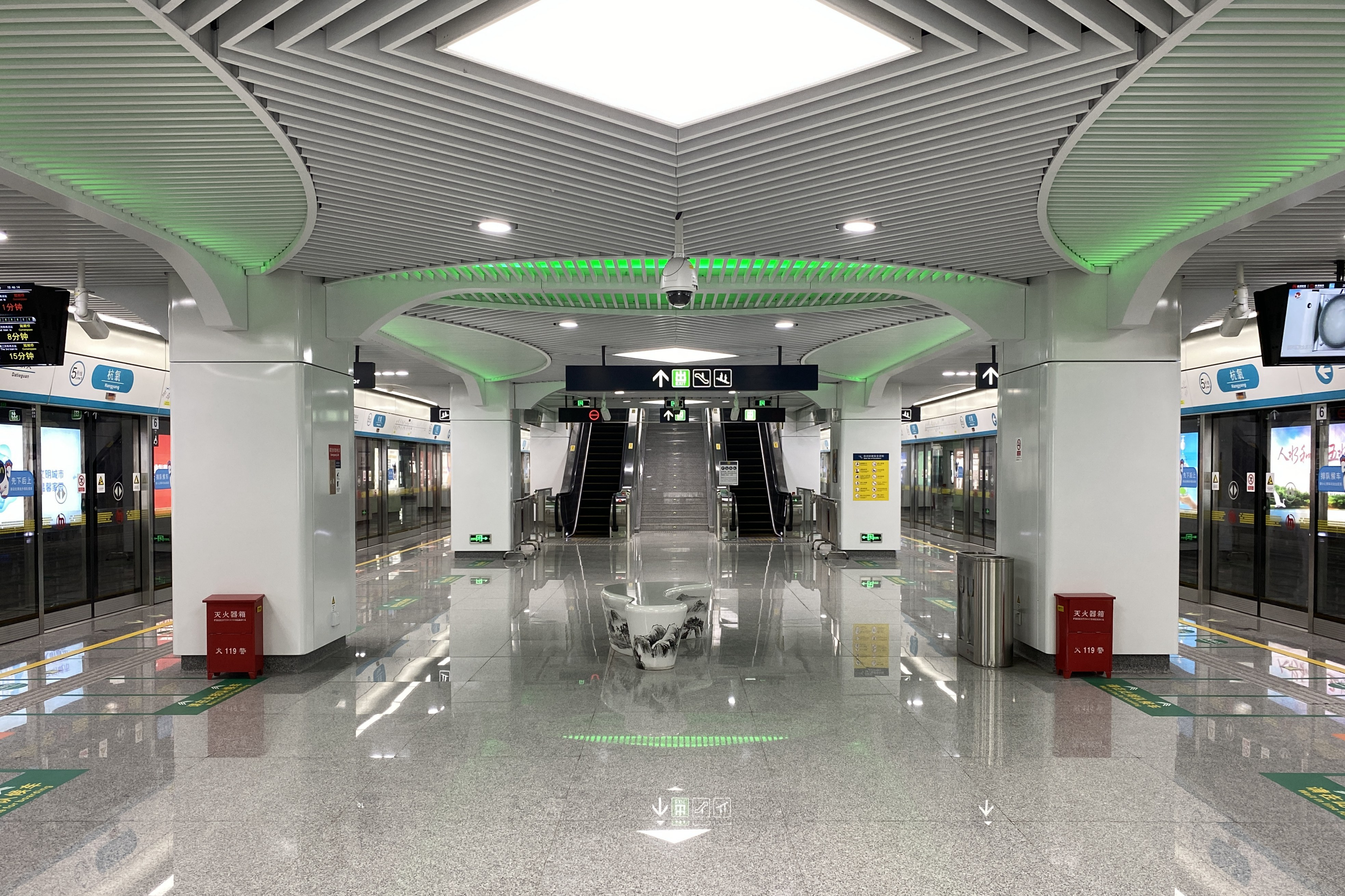 杭氧站站台